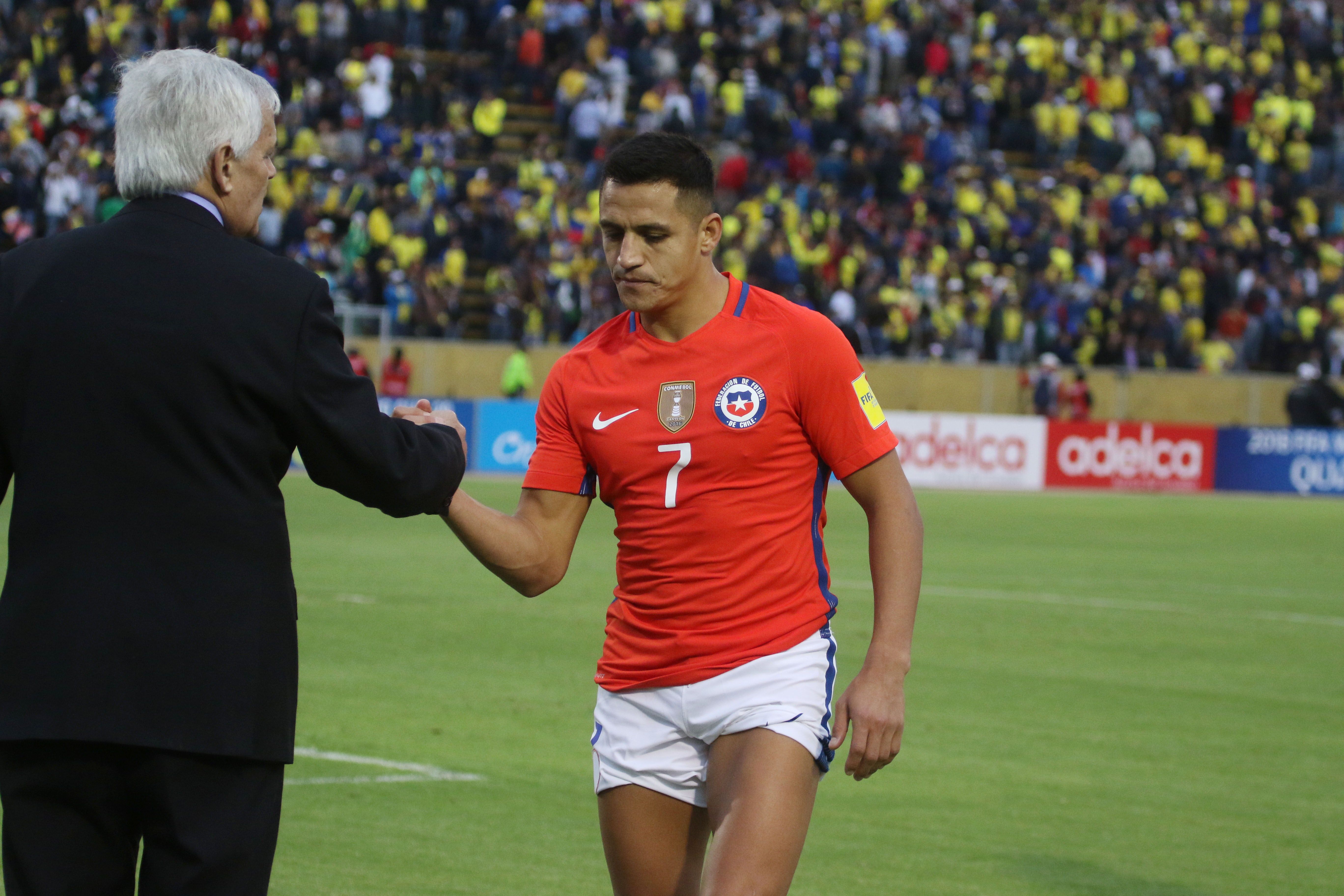 Quito, 6 oct (Andes).- Ecuador (amarillo) volvió a mostrar la imagen que lo llevó a ganar los primeros cuatro partidos en seguidilla de las Eliminatorias al Mundial Rusia 2018 y con algunas variantes se impuso por 3-0 a Chile en el estadio Olímpico Atahualpa de Quito.ANDES/Micaela Ayala V.